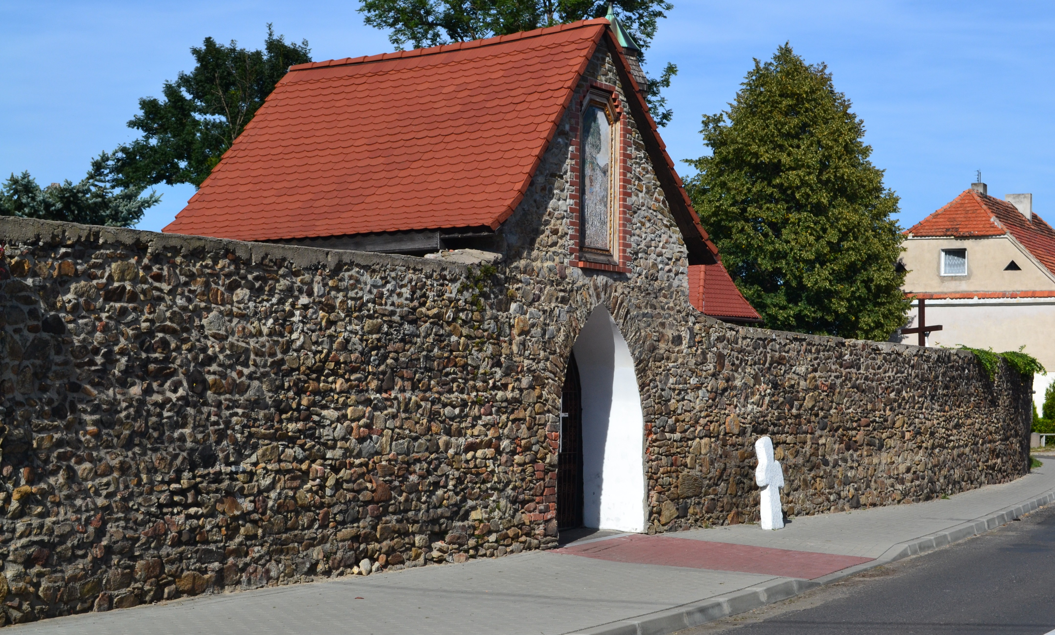 Kamienica - mur z bramkami przy kościele par. p.w. św. Jerzego 09.1966.